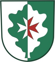 Znak obce Doubravice (okres Strakonice)